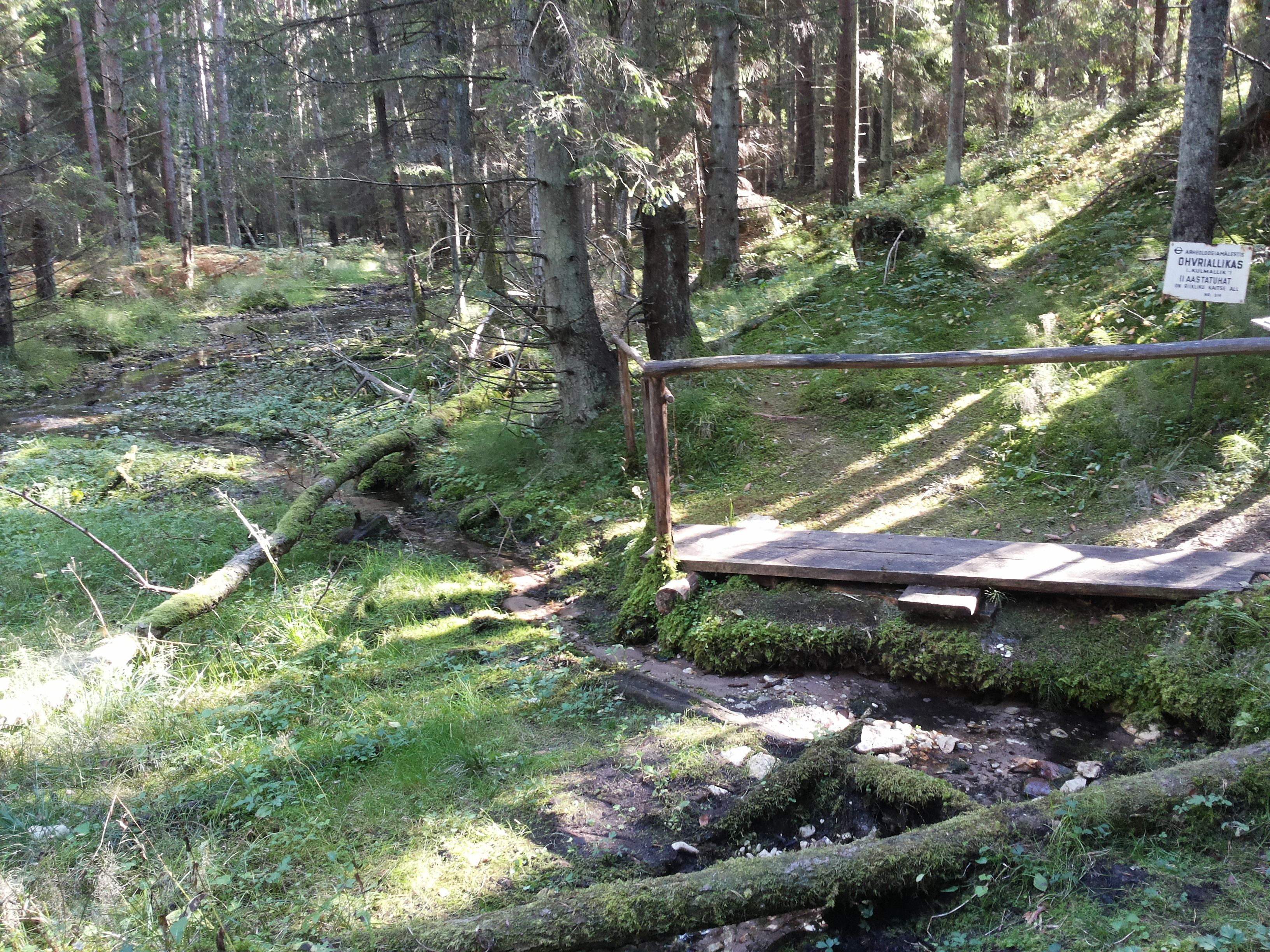 Ohvriallikas "Külmallik"